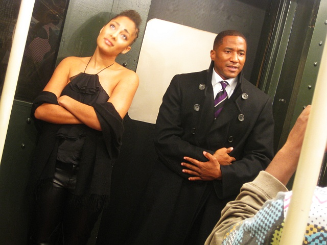 MeSoHungry foodblog post